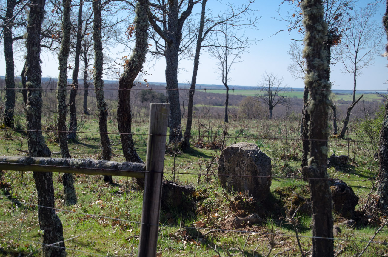 Dehesa de Valdellán. Estela.